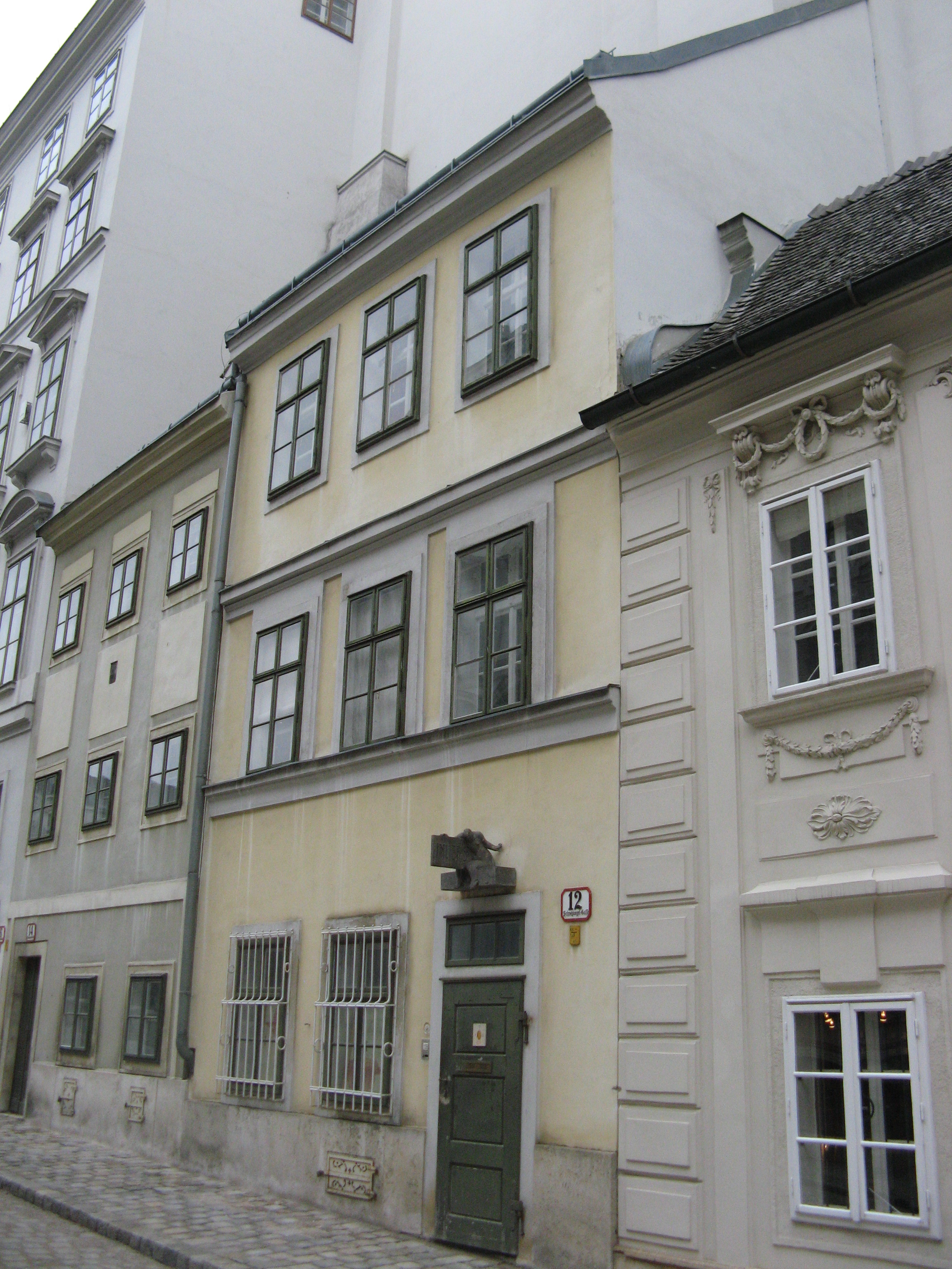 Haus Schreyvogelgasse 12 (Anfang 19. Jh.), Wien-Innere Stadt